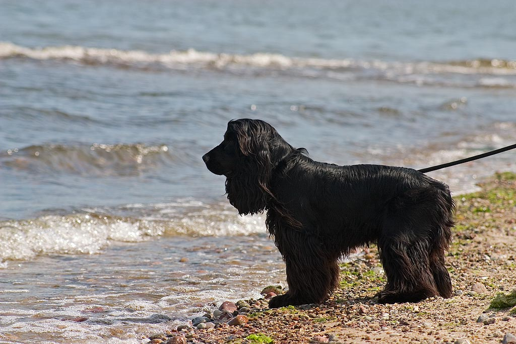 English Cocker Spaniel "Max" Author: Adam Kumiszcza